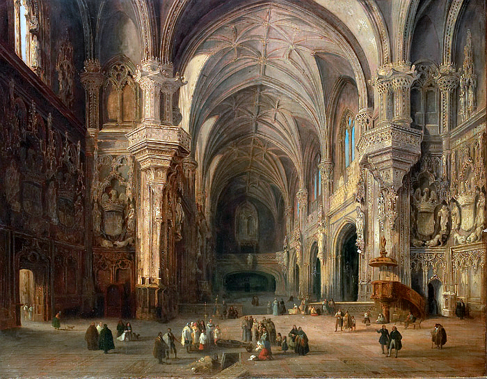 Interior de la iglesia de San Juan de los Reyes de Toledo (España)